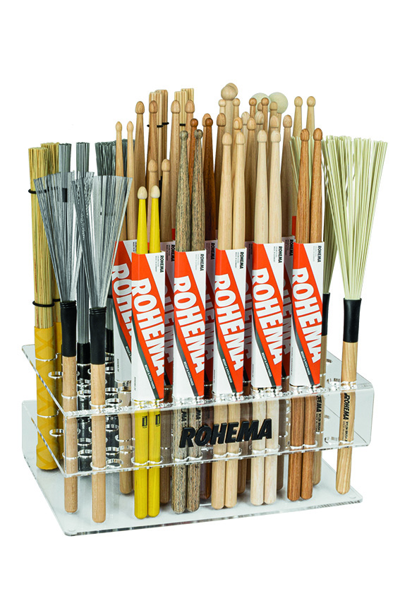 ROHEMA Sticks, Rods und Brushes